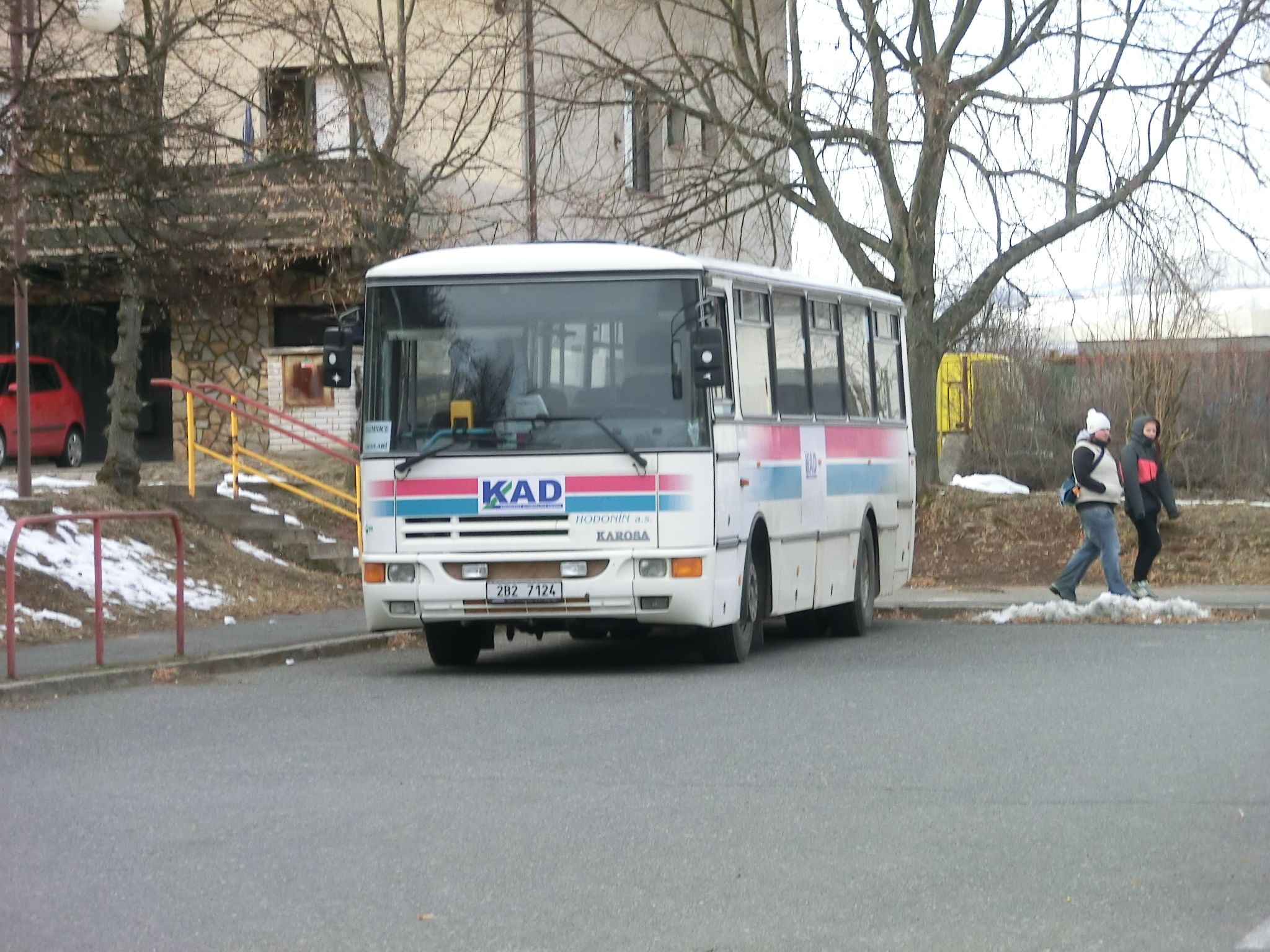 Karosa C 935 společnosti Krkonošská automobilová doprava na autobusovém nádraží v Jilemnici. Autobus je dosud ve firemních barvách společnosti ČSAD Hodonín, odkud byl jako ojetý zakoupen.